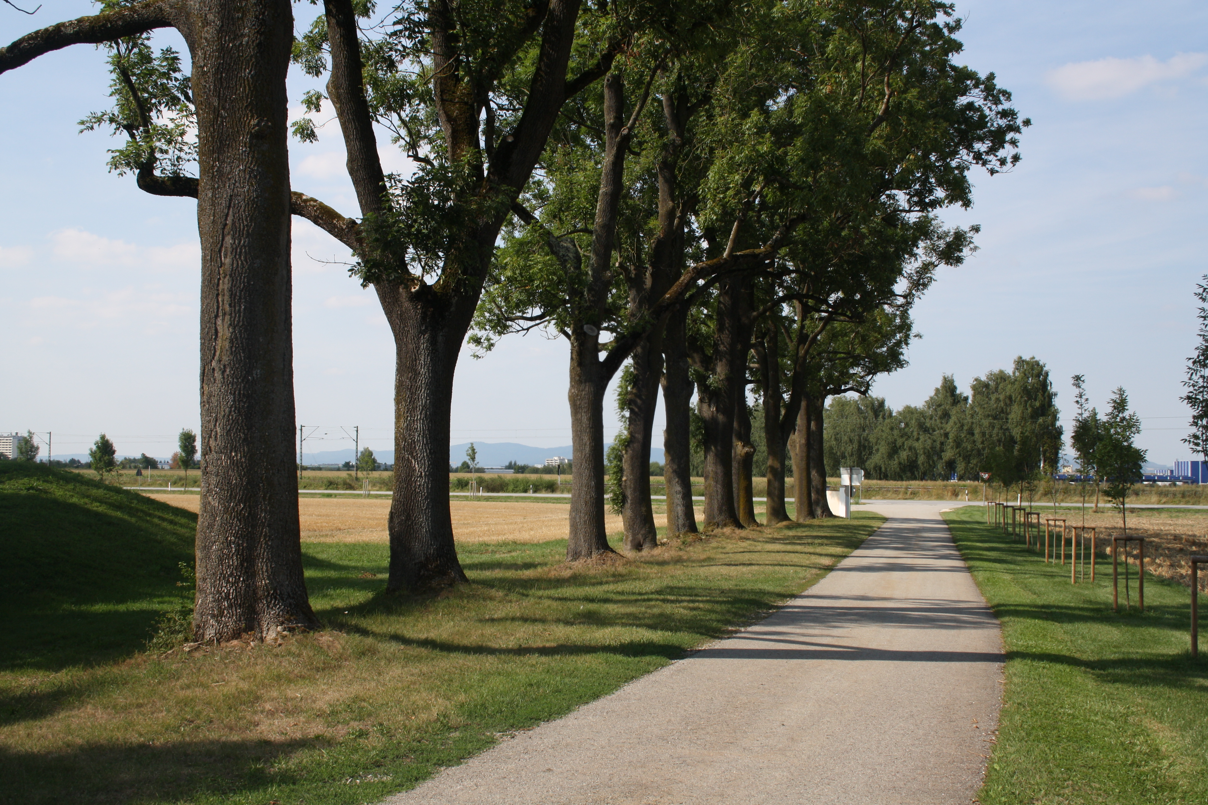 Allee ins Königreich